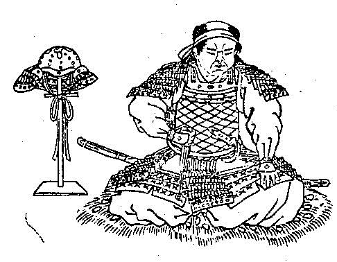 国司信濃